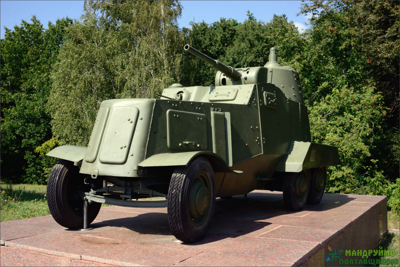 бронеавтомобіль штабу фронту БА-10 №530 на постаменті (Монумент на честь воїнів південно-західного фронту), урочище Шумейкове, 15 км на південь від м. Лохвиці, меморіальний комплекс